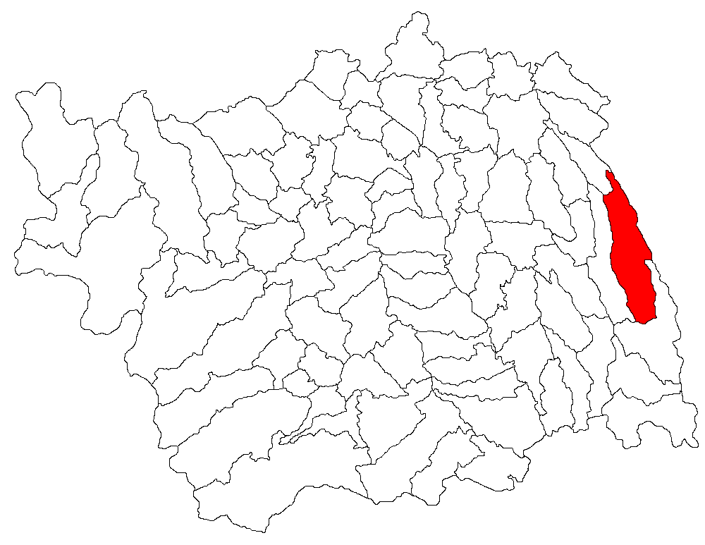 Categorie:Hărţi ale judeţului Bacău